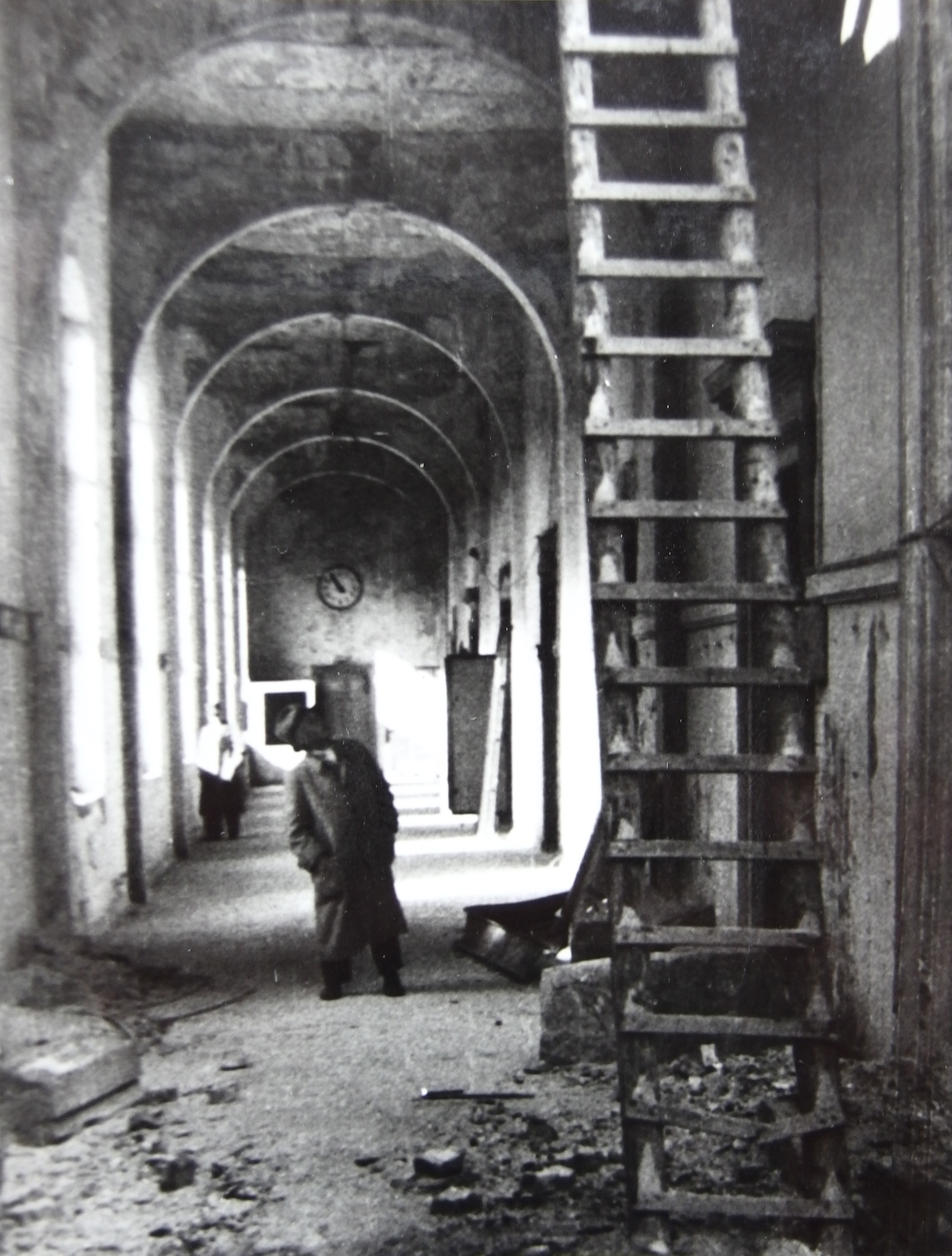 Direktor Werner Heuser im Gang der Kunstakademie Düsseldorf, 31. Januar 1946